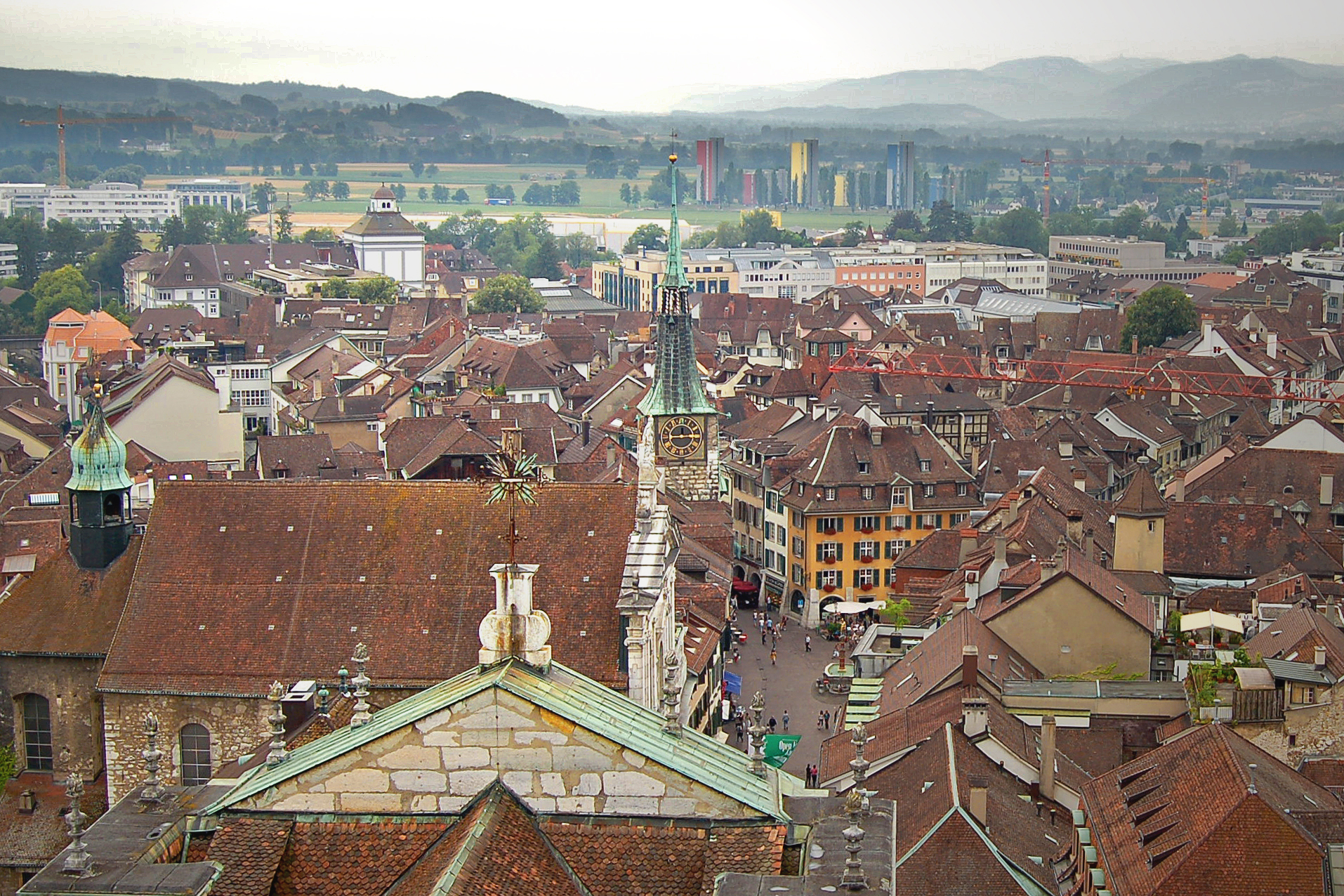 Solothurn vom St. Ursenturm Sicht auf Zytglogeturm und Weststadt Richtung Grenchen/Biel